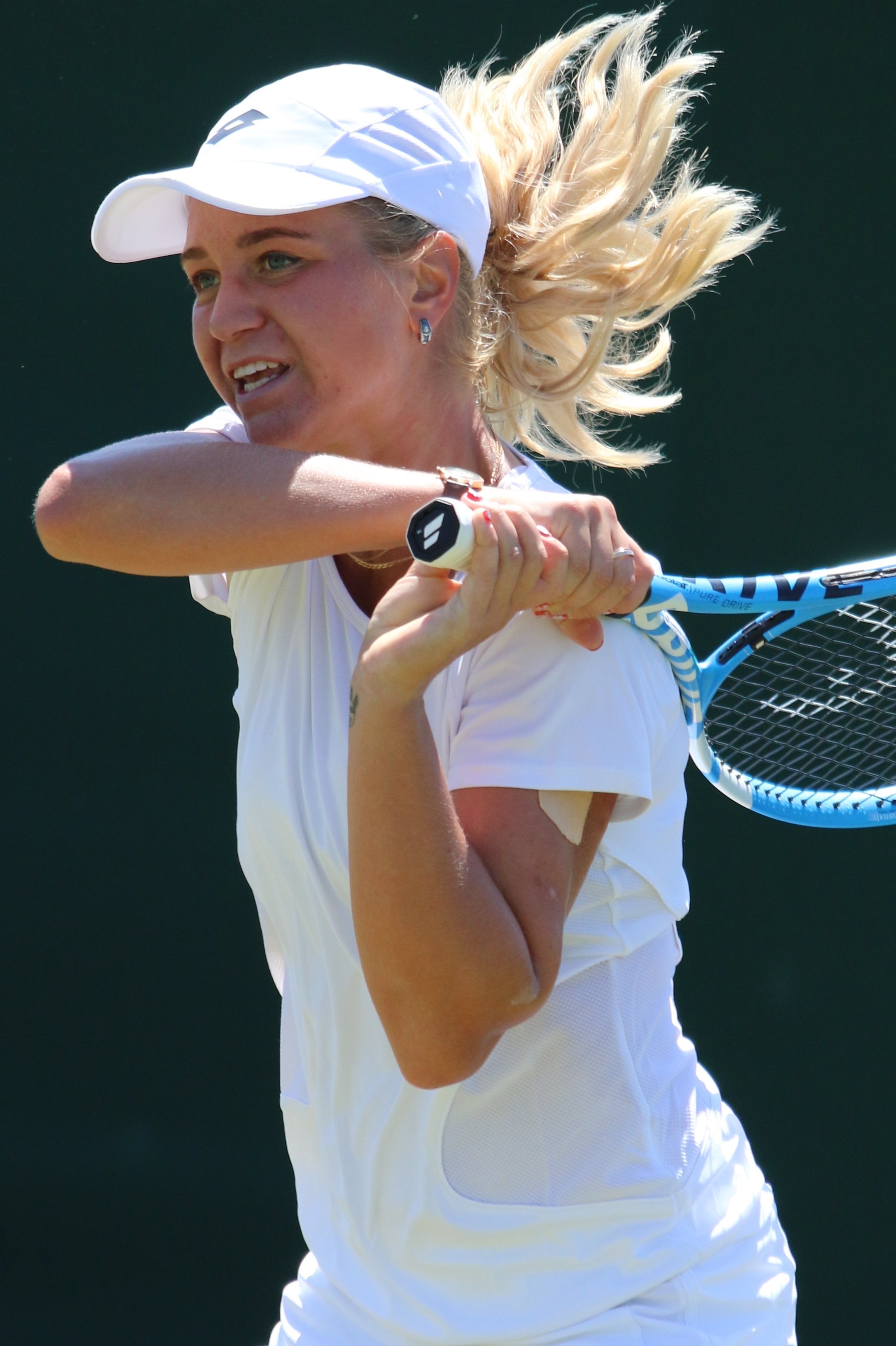 Khromacheva WMQ18 (5)